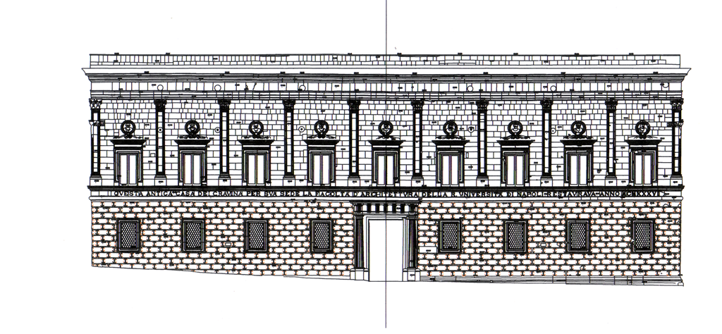 Naples, Palazzo Gravina (design CAD)